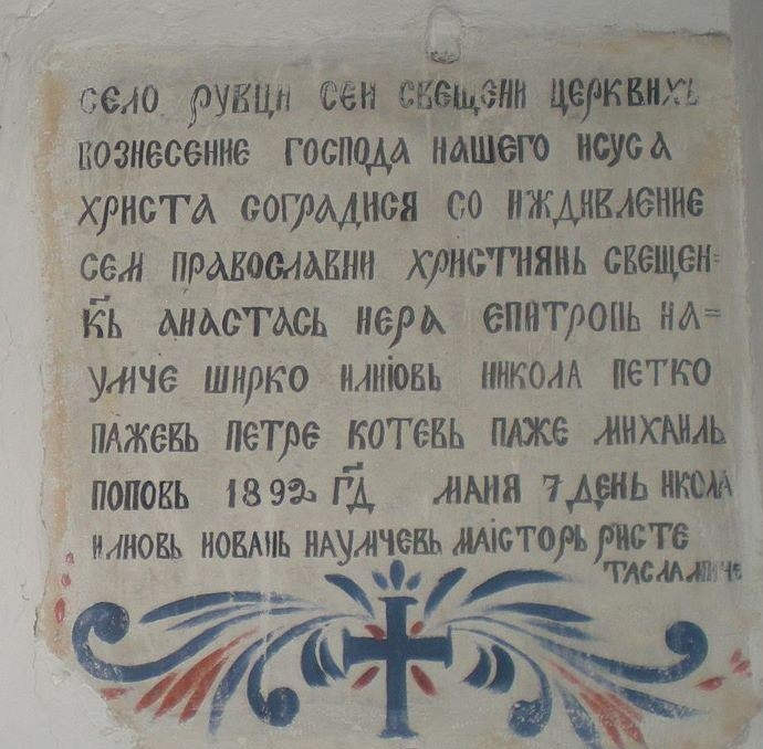 Надпис в църквата „Възнесение Господне“ в Мало Рувци